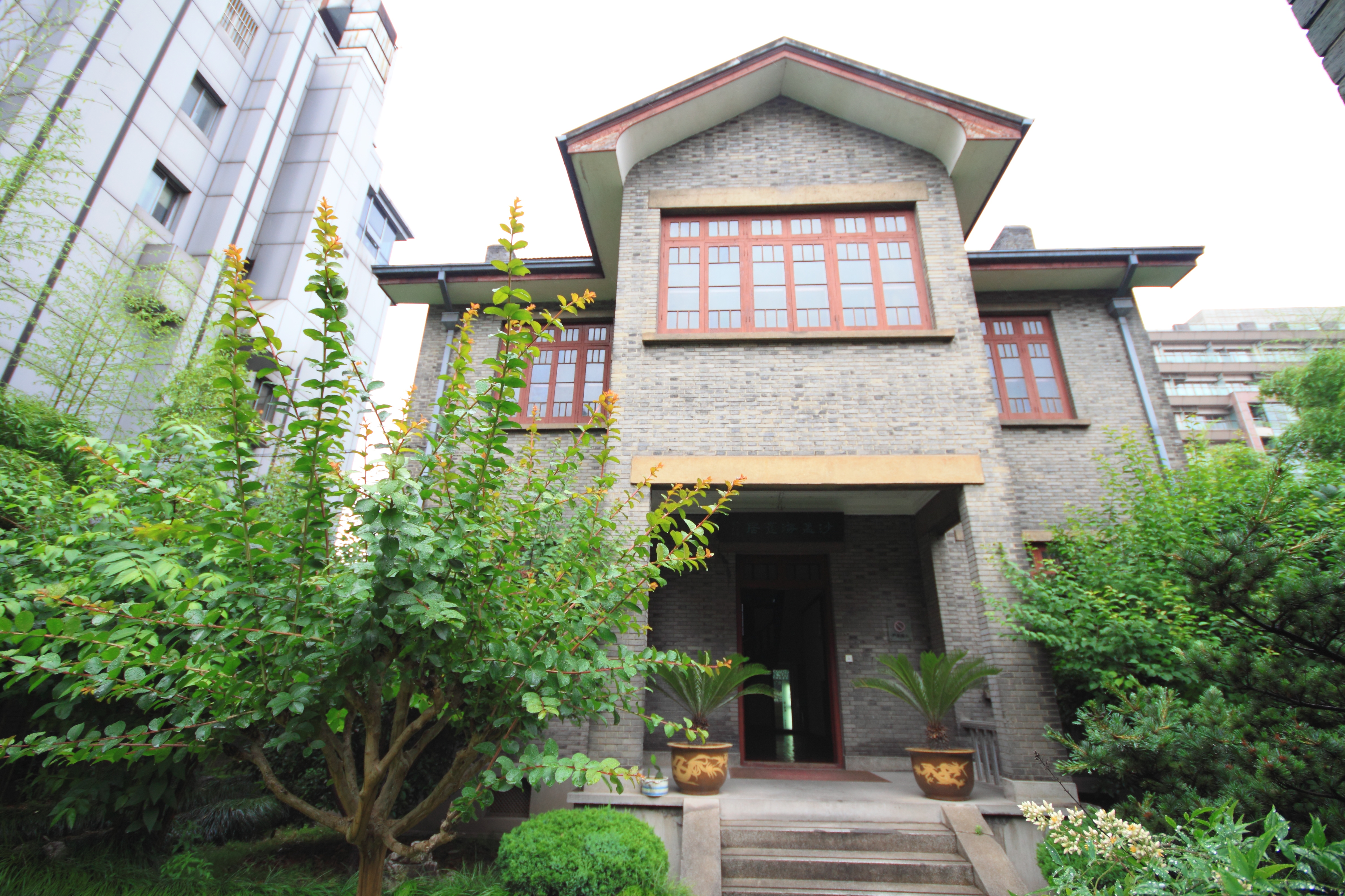 沙孟海旧居，位于中国浙江省杭州市龙游路15号，是中国当代书法家沙孟海晚年居住的地方。